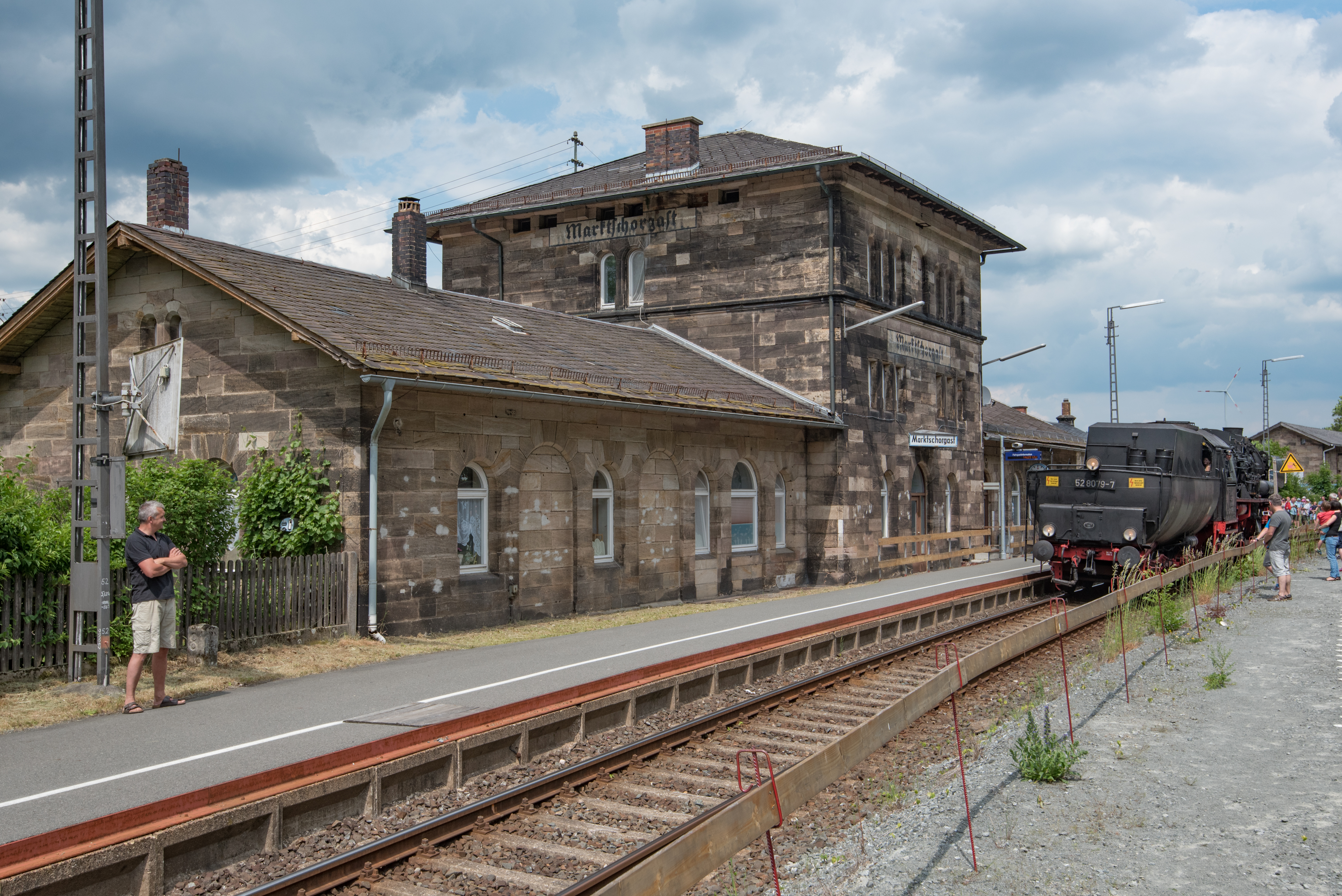 Marktschorgast, 52 8079 im Bahnhof Marktschorgast